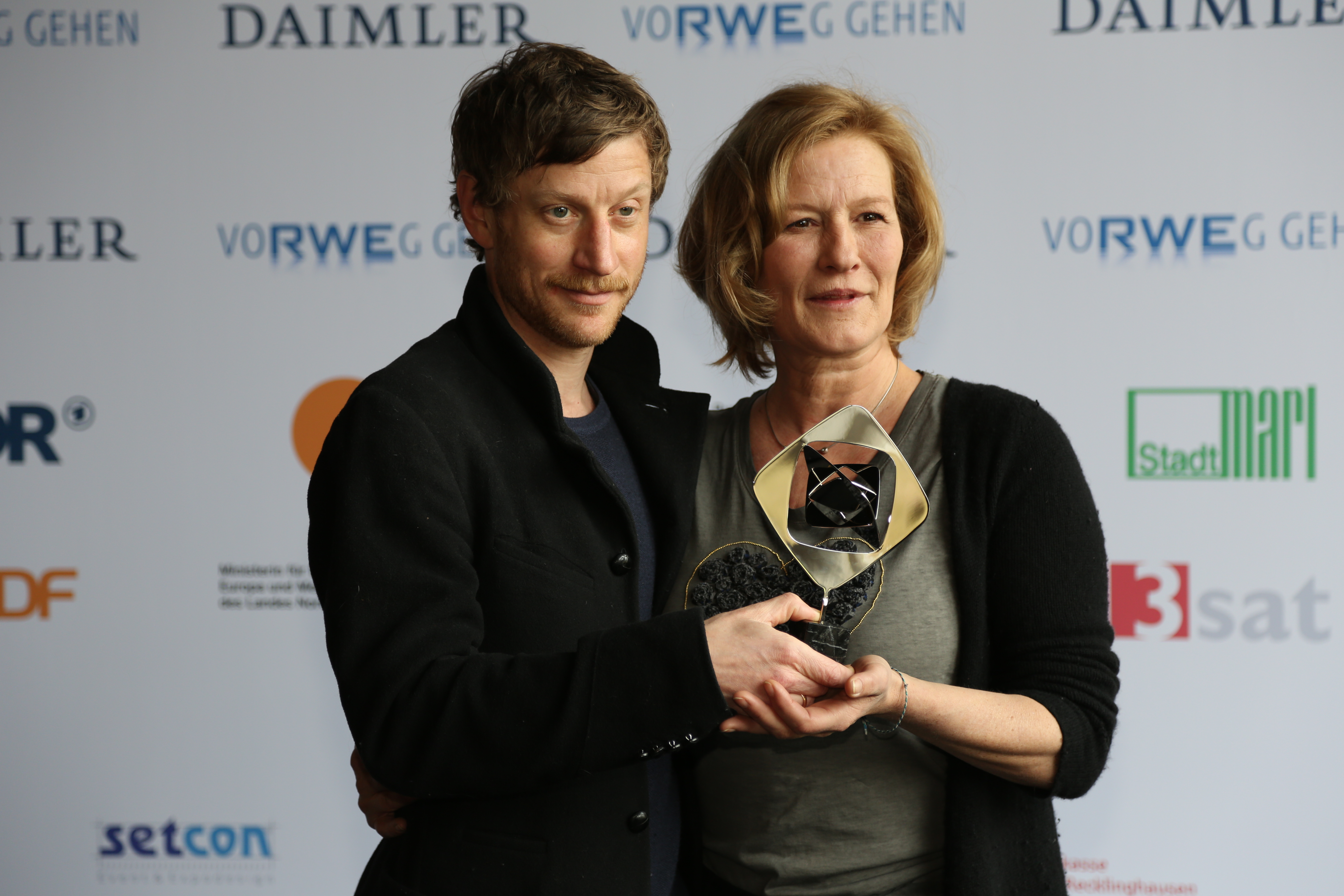 Maxim Mehmet und Suzanne von Borsody bei der Grimme-Preis-Verleihung 2015